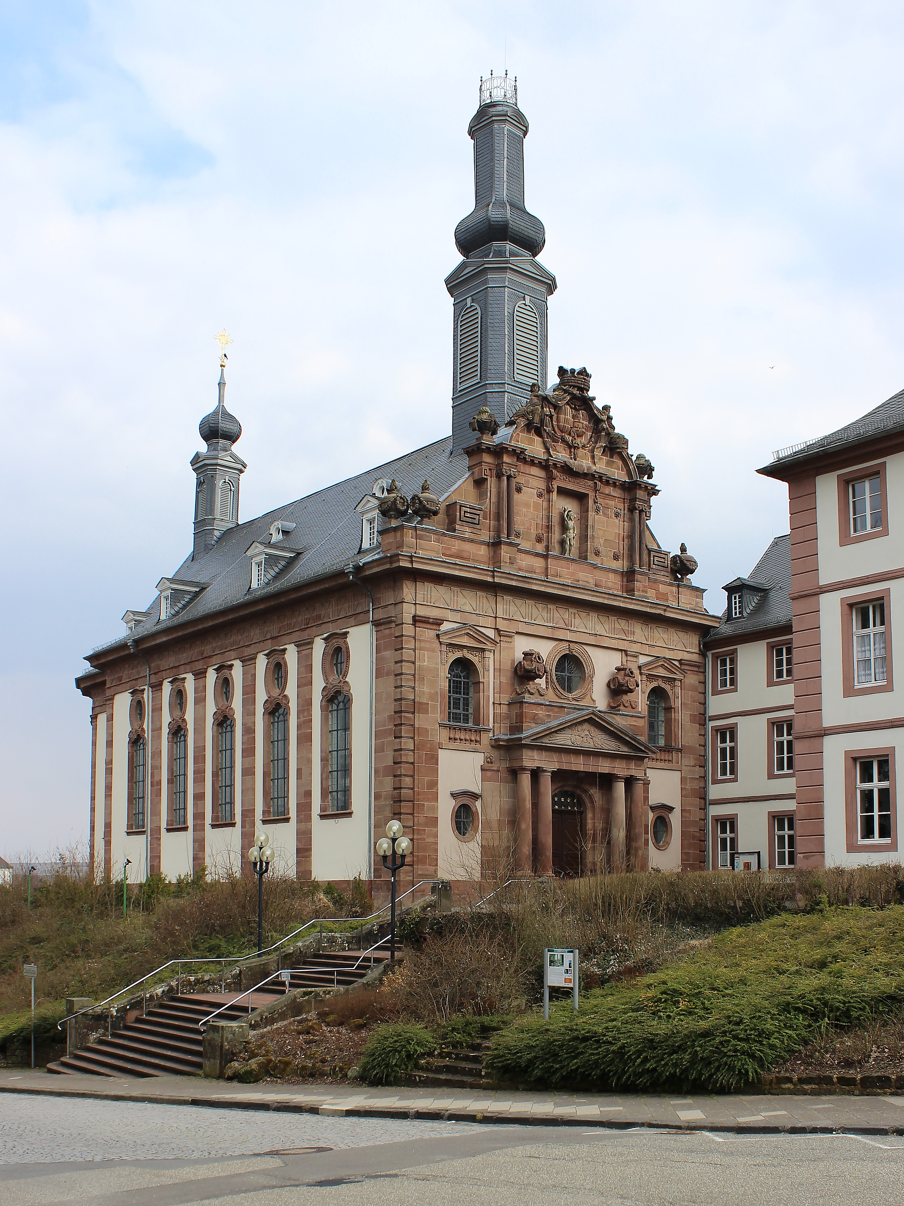 Schlosskirche, Blieskastel, Saarland